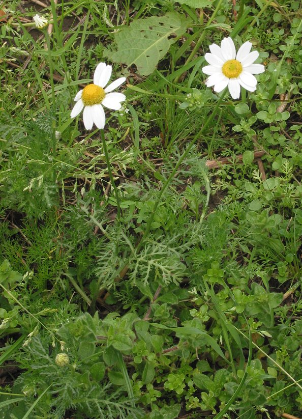 Valse kamille; half september.